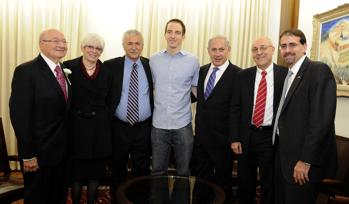 _D3S7043